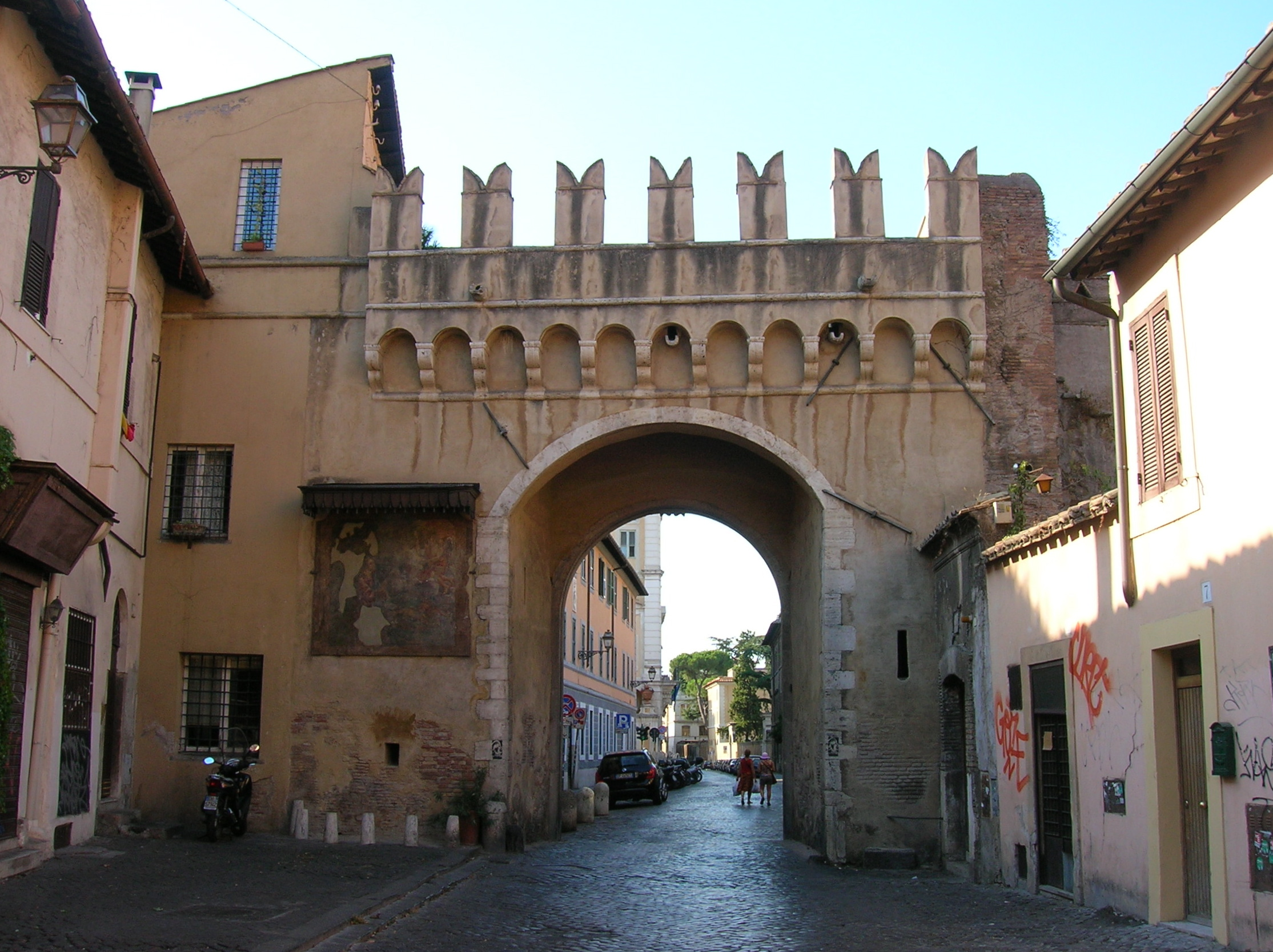 La porte Settimiana à Rome dans le mur d'Aurélien dans le quartier de Trastevere